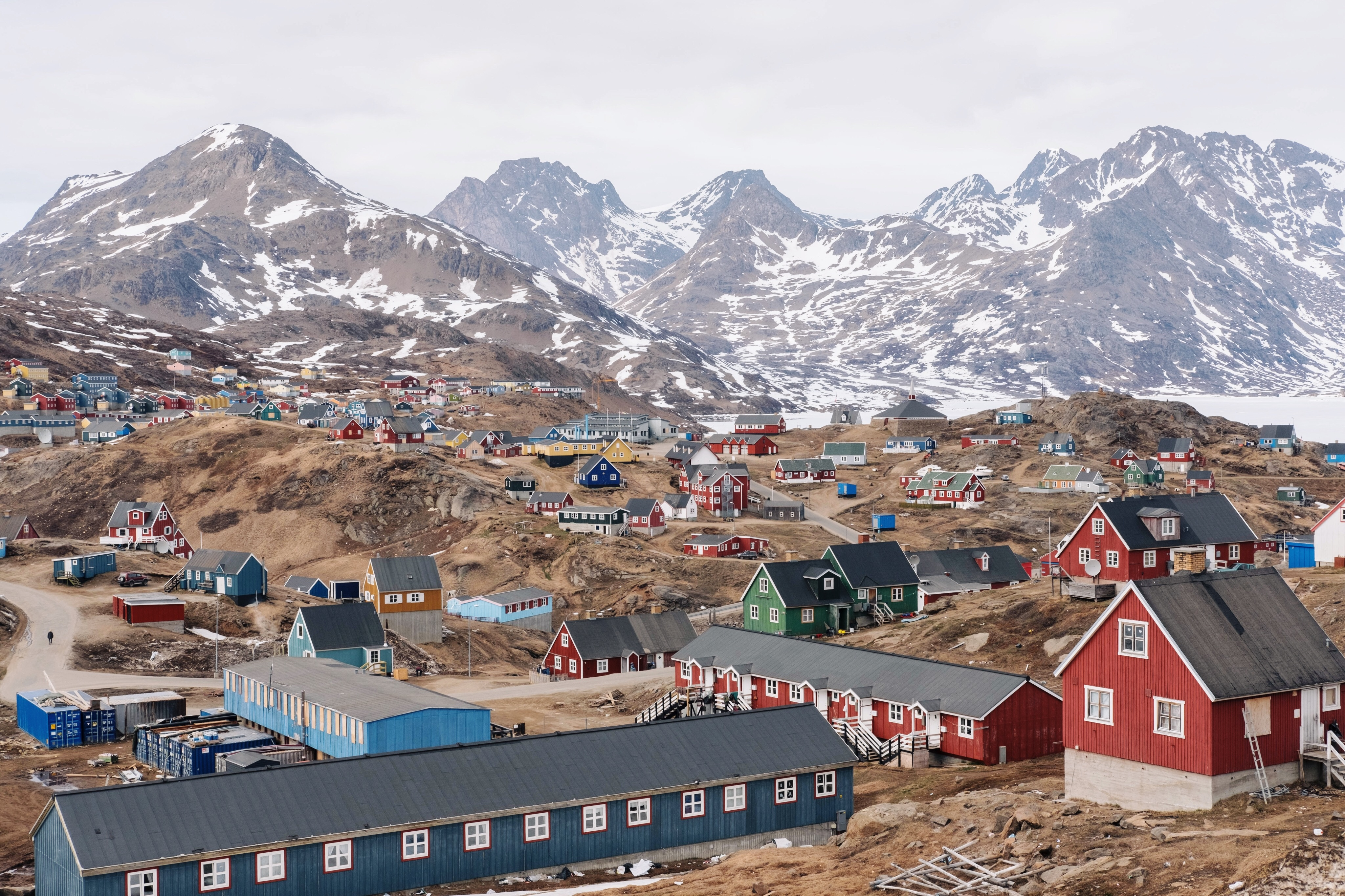 Tasiilaq